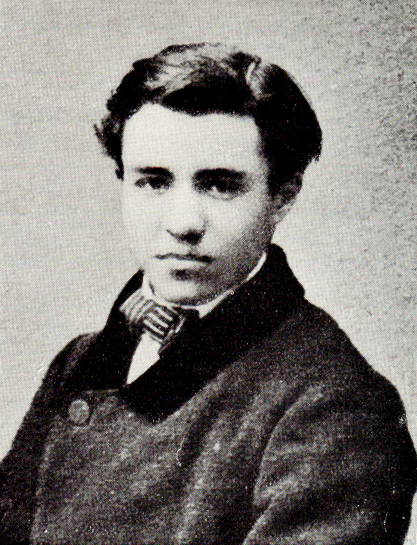 Georges Clemenceau à 16 ans.